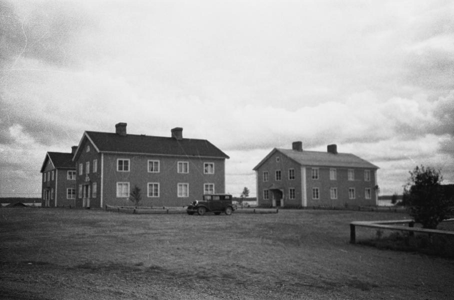 Kyrkstaden.; (01) Exteriörer, detaljer; Byggnadsverk; Religionsutövning - kyrkor